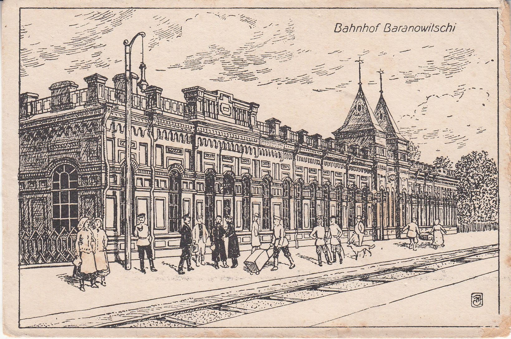 Беларуская (тарашкевіца): Баранавічы (Baranavičy). Чыгуначная станцыя